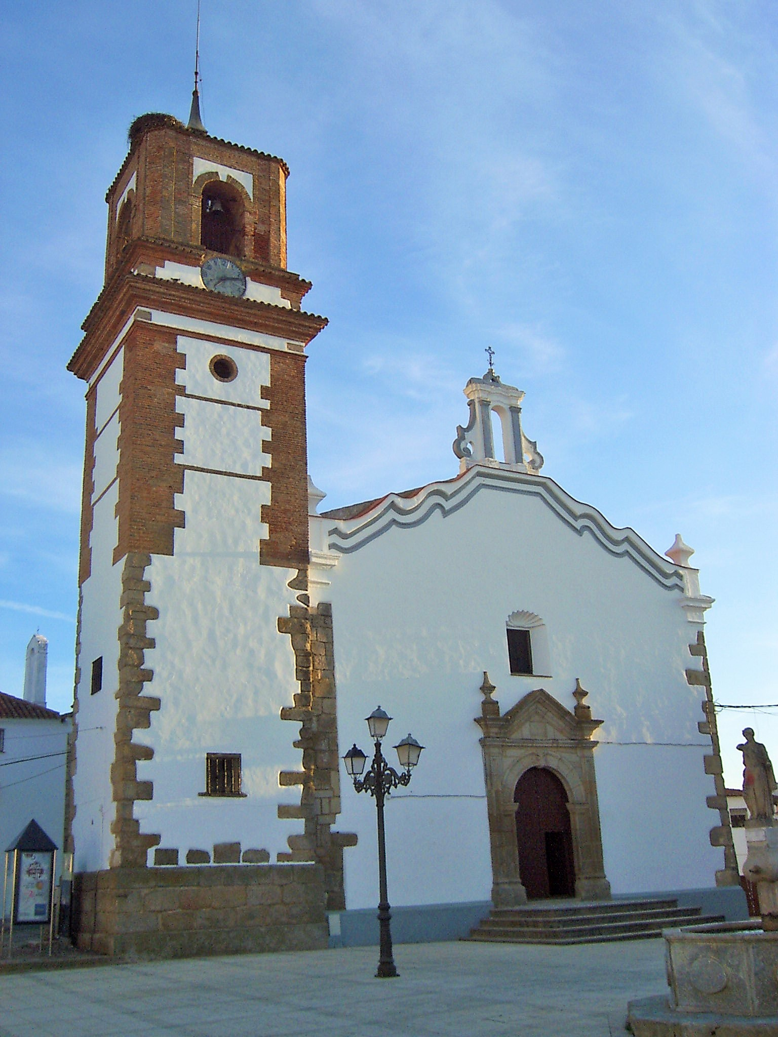 Iglesia Parroquial de San Blas